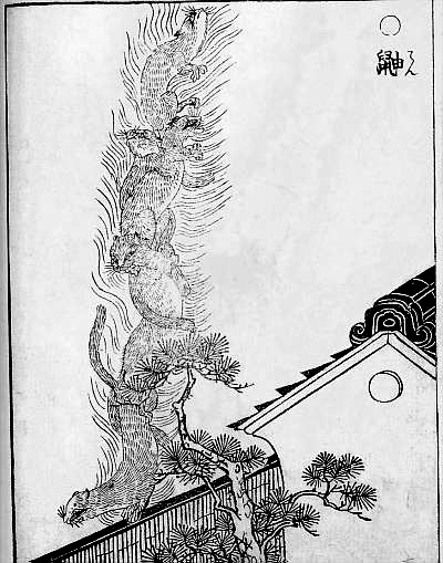 Ten (鼬) by Toriyama Sekien